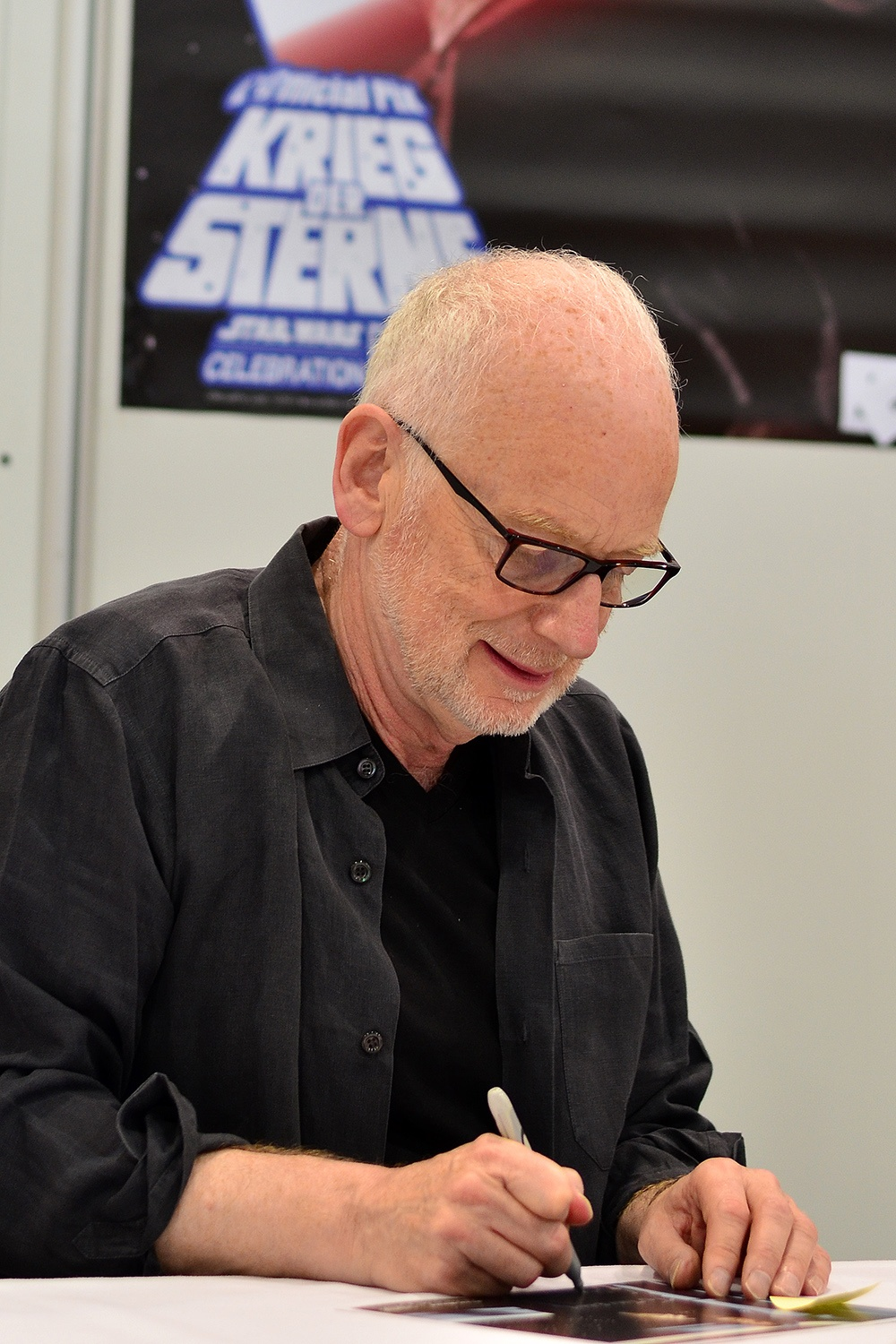 Star Wars Celebration Europe II, Essen, Deutschland